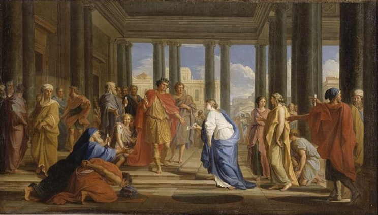 TRAJAN RENDANT LA JUSTICE ; Salon : Salle des gardes de la reine, Grands appartements du Château de Versailles Emplacement : voussure ; est